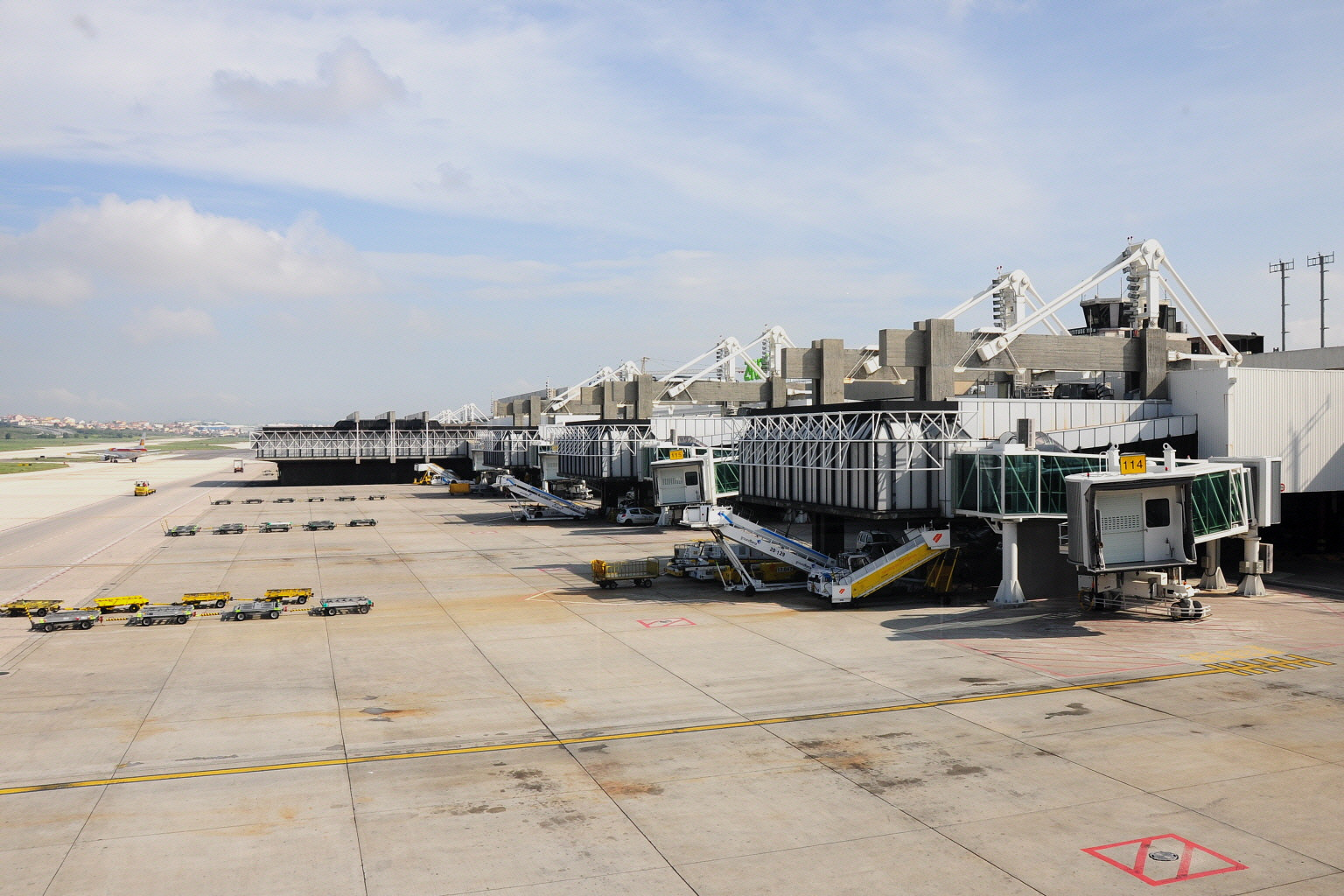 Airport of Lisbon